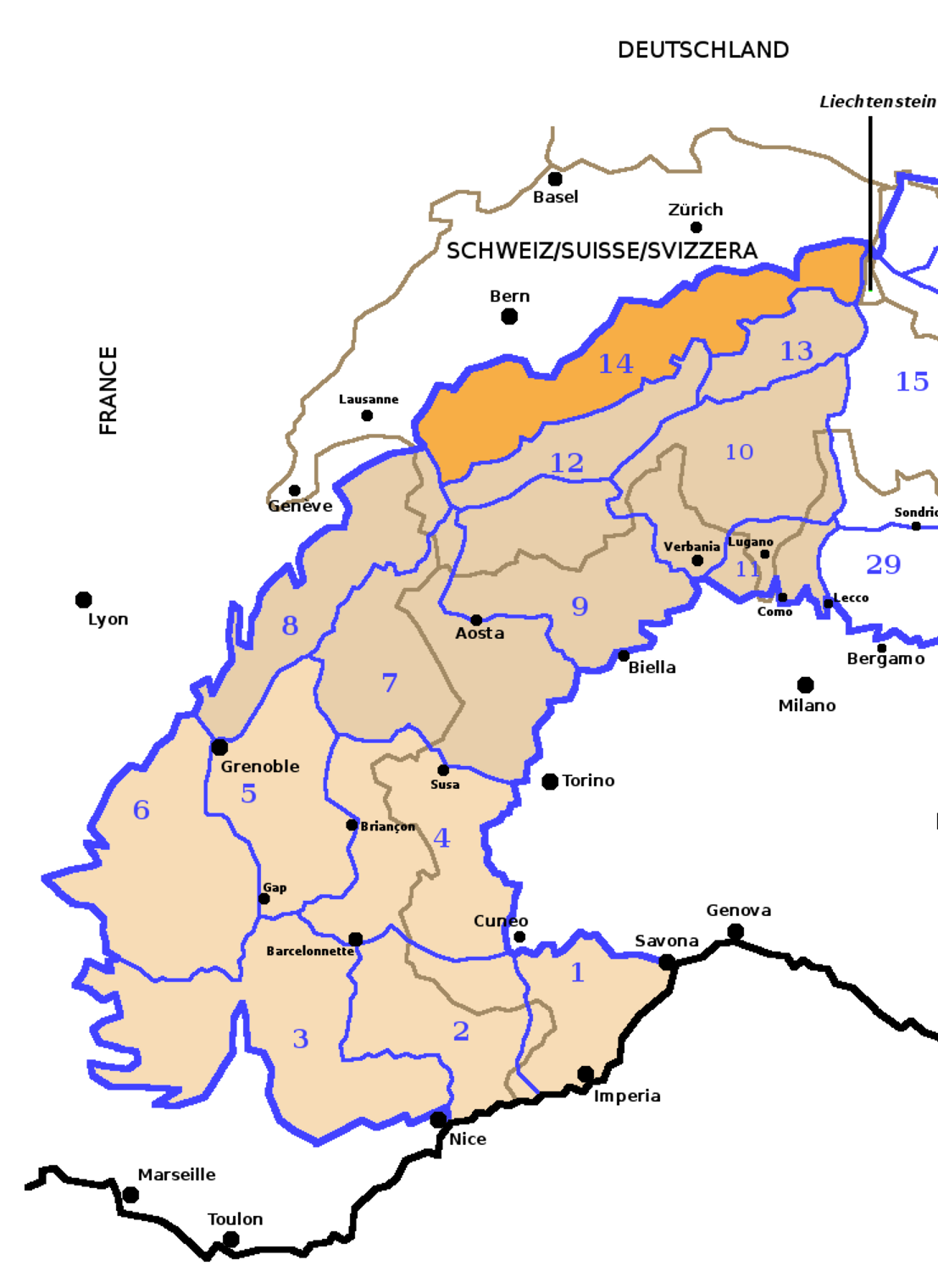 Alpi Occidentali secondo la SOIUSA con evidenziate le Prealpi Svizzere